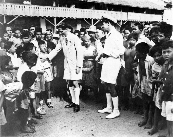 Repronegatief. De Chinese consul te Makassar bezoekt zijn landgenoten in Zuid-Celebes